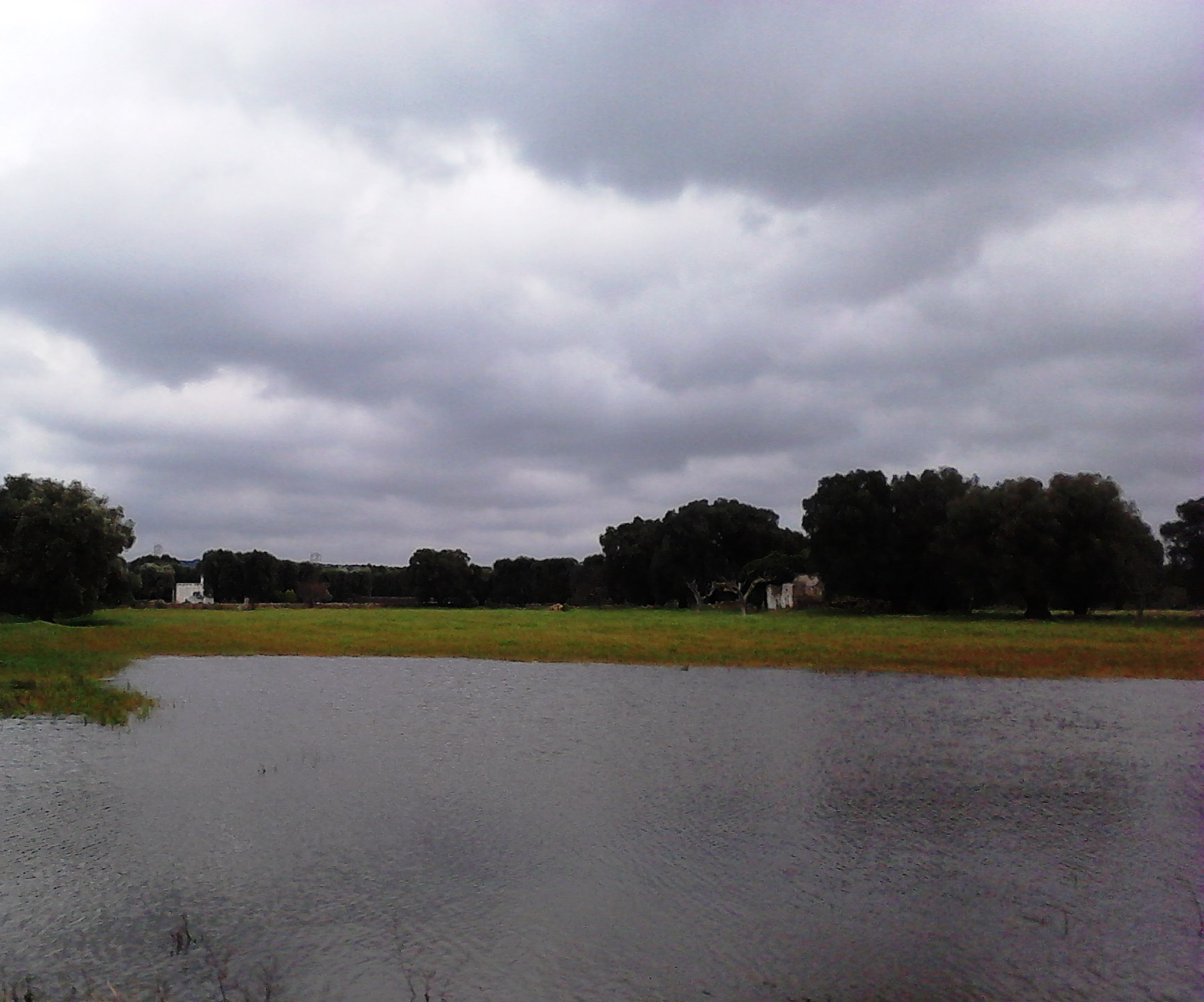 Villa Castelli, località Antoglia, area esposta ad allagamento stagionale, zona paludare bonificata.